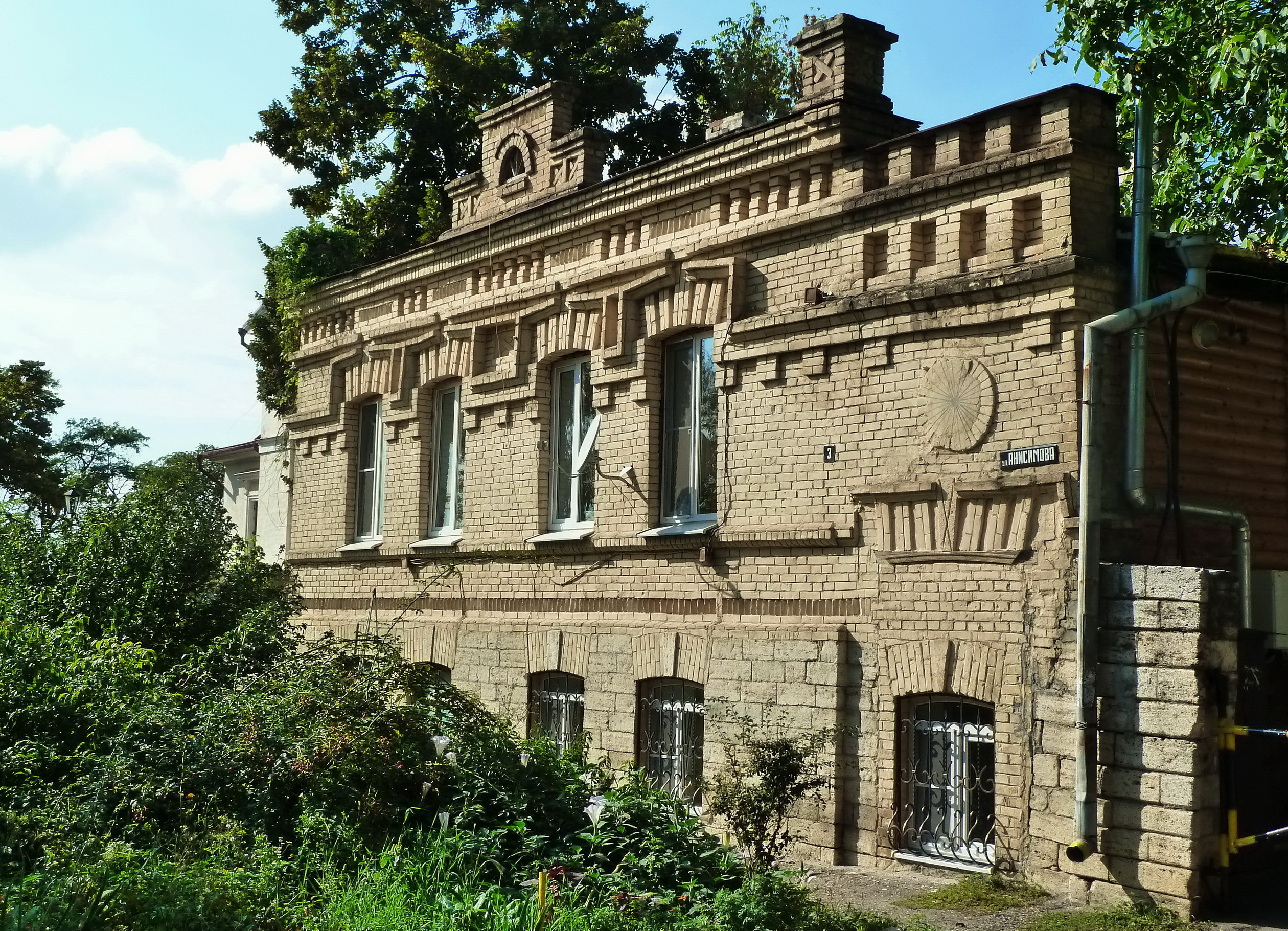 Дом ксендза (Ставропольский край, Пятигорск, анисимова улица, 1)